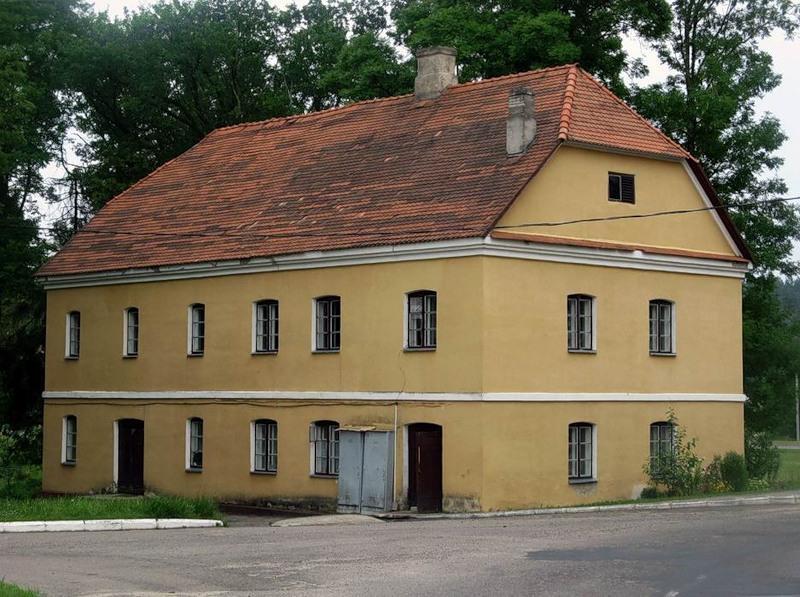 Жилой дом